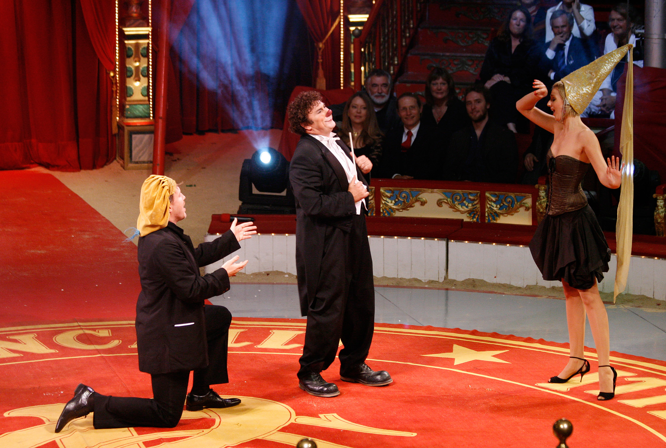 Nicholas Ofczarek und Bettina Mönch mit dem Clown David Larible während der Verleihung des Nestroy-Theaterpreises 2009 (Circus Roncalli auf dem Wiener Rathausplatz).